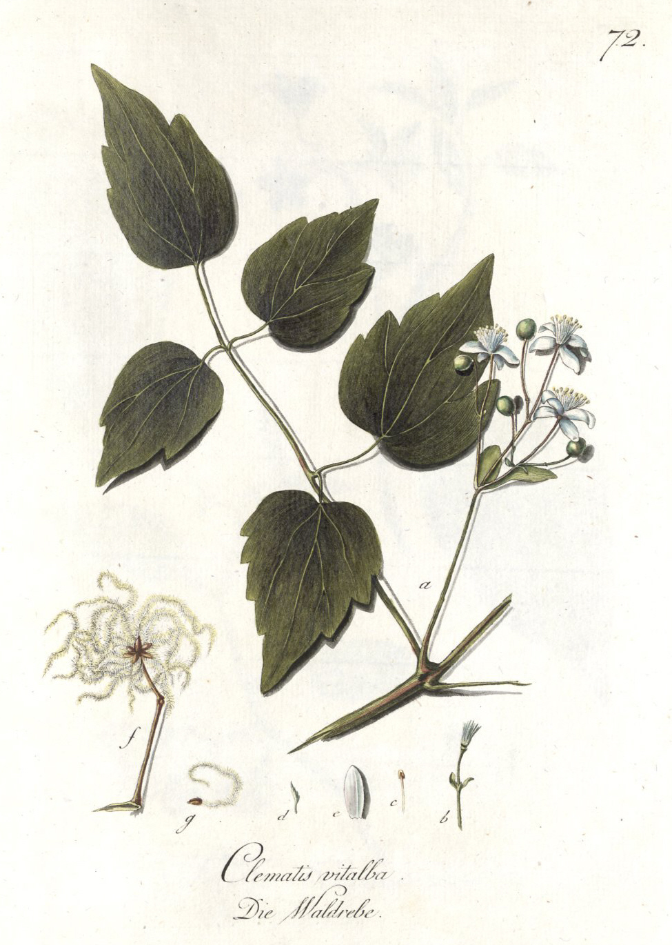 Abbildung Der Hundert Deutschen Wilden Holz-Arten Nach Dem Nummern-Verzeichnis Im Forst-Handbuch Von F. A. L. Von Burgsdorf; Tafel: Die Waldrebe (Clematis vitalba) Hexenstrang, Hagseiler Erklärung